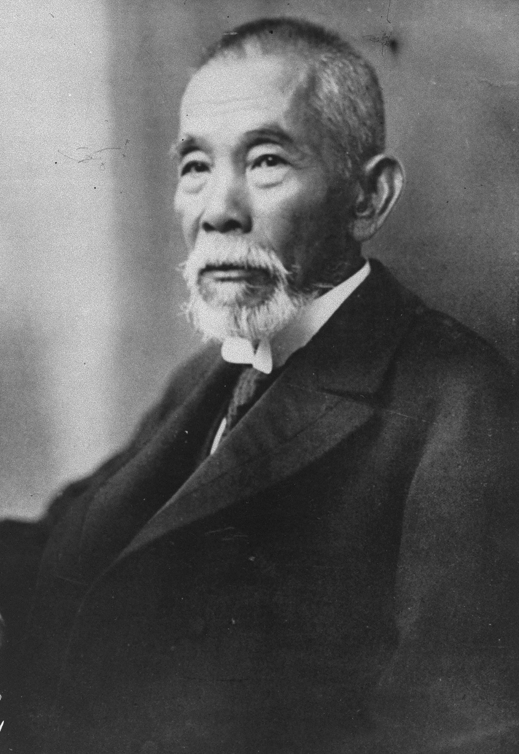 Portrait of Inukai Tsuyoshi (犬養毅, 1855 – 1932)